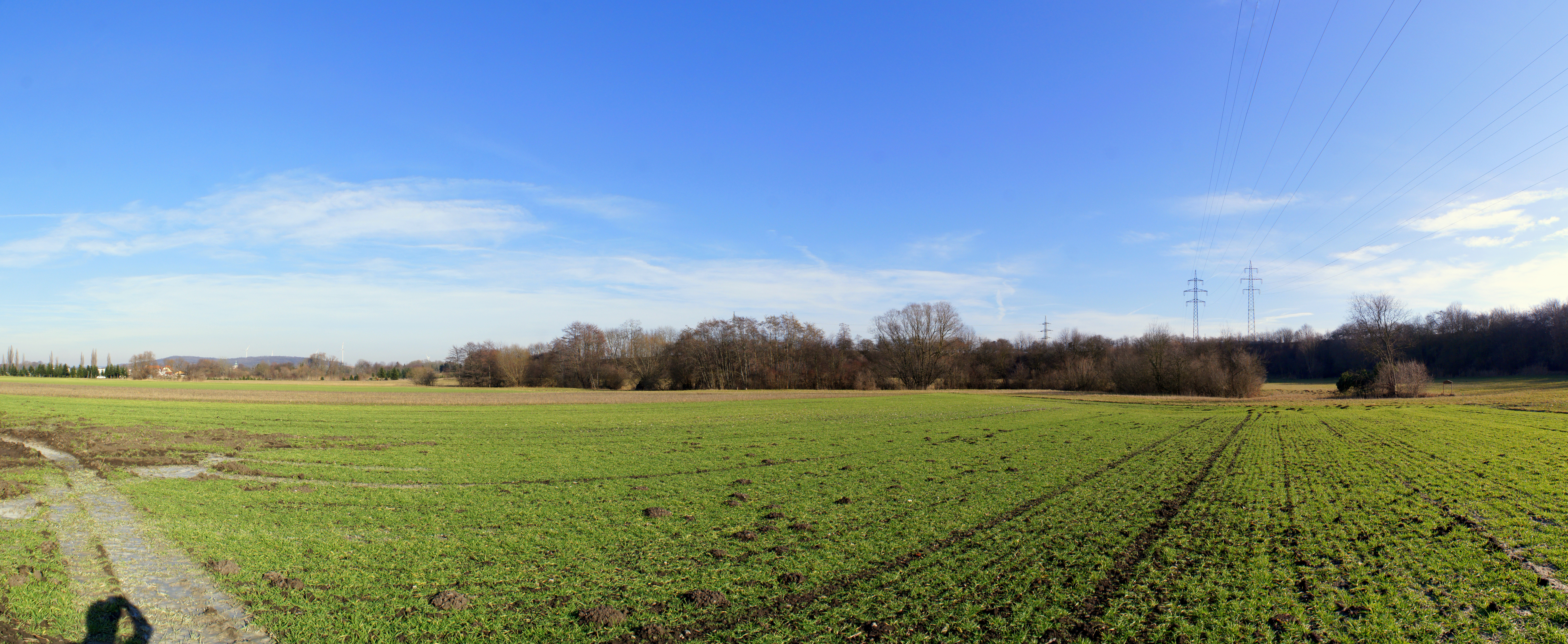 Feuchtbiotop „Siebenbründl“ This media shows the natural monument in Lower Austria with the ID P-039.